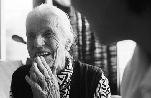 Altenpflege durchgeführt von einem Zivildienstleistenden in München